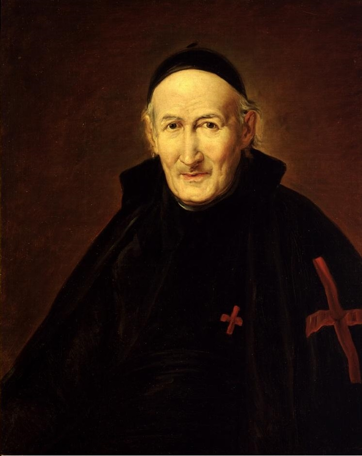 Retrato de Fray Vicente Blasco y García (1735-1813), rector de la Universidad de Valencia. En el hábito y en la capa aparece bordada en rojo la cruz de la Orden de Montesa. Este cuadro es una copia del conservado en el Museo de Bellas Artes de Valencia.